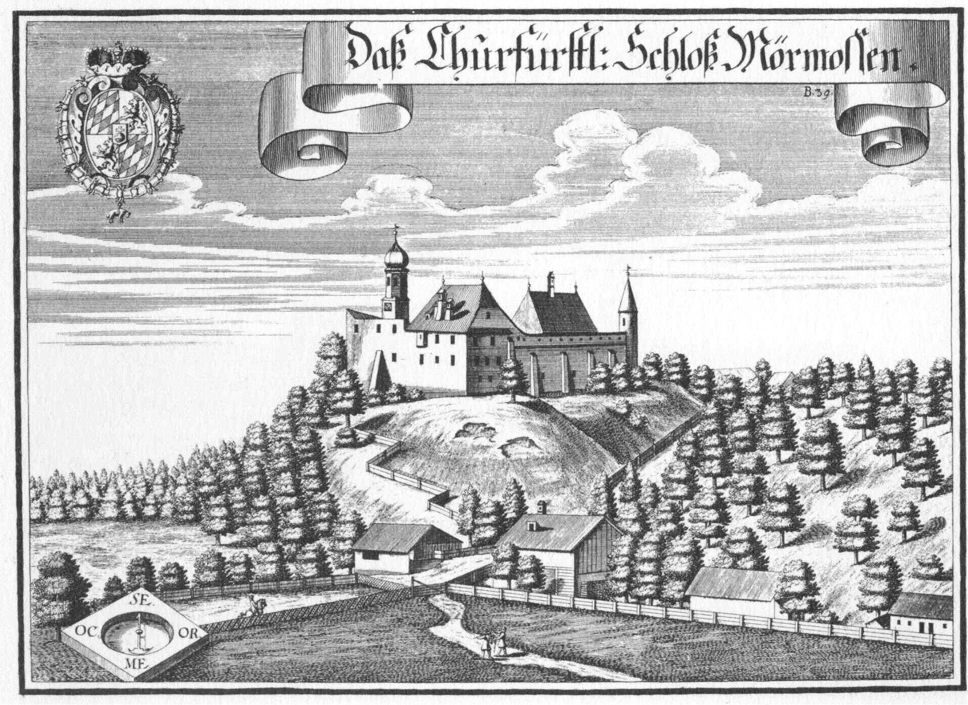 Schloss Mörmoosen nach einer Radierung von Michael Wening von 1721